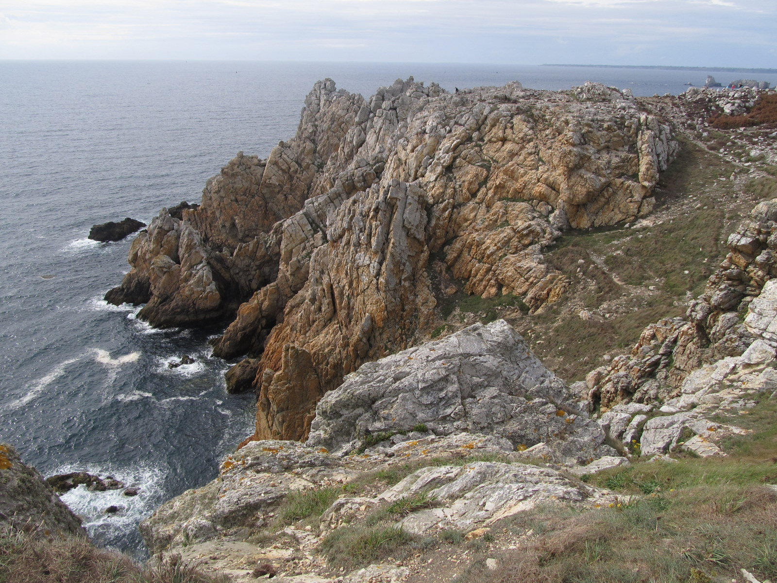 Pointe de Pen-Hir